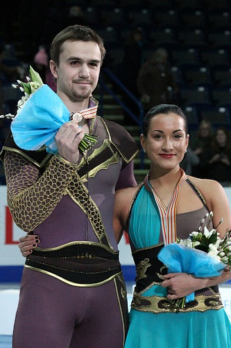 Ксения Столбова и Фёдор Климов с бронзовыми медалями чемпионата Европы по фигурному катанию 2012